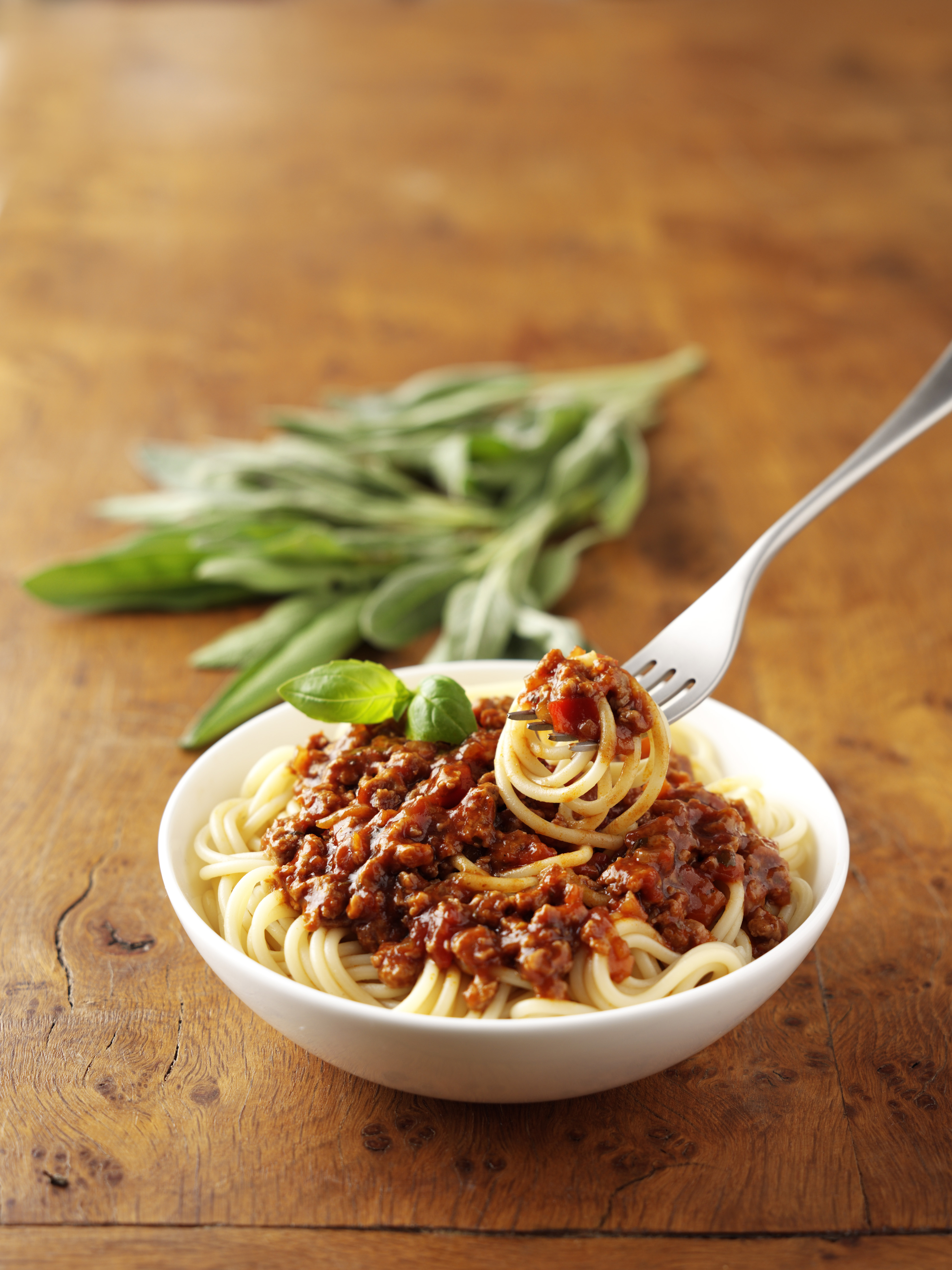 Quorn Spaghetti Bolognese